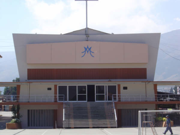 Santuario de Maria Auxiliadora.